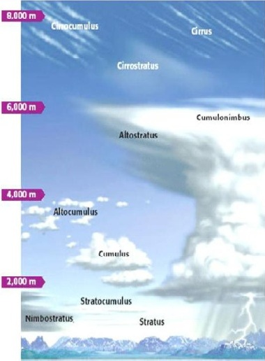 Clasificare nori